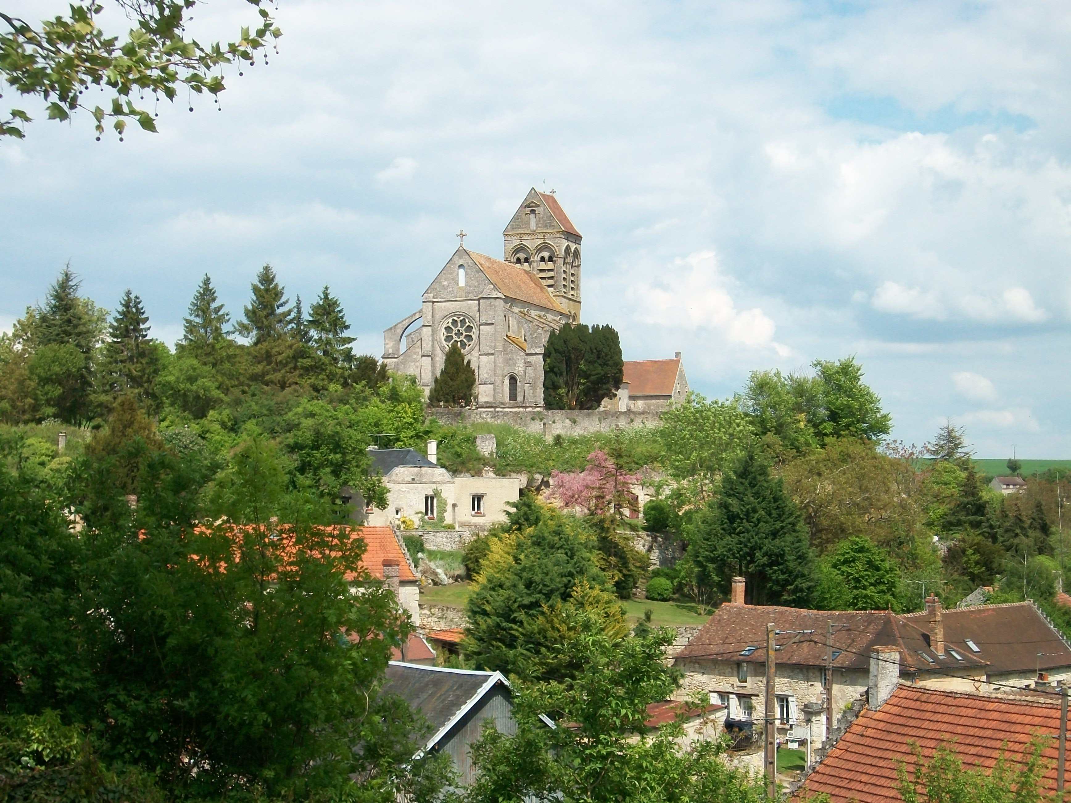 Eglise et village de Lesges